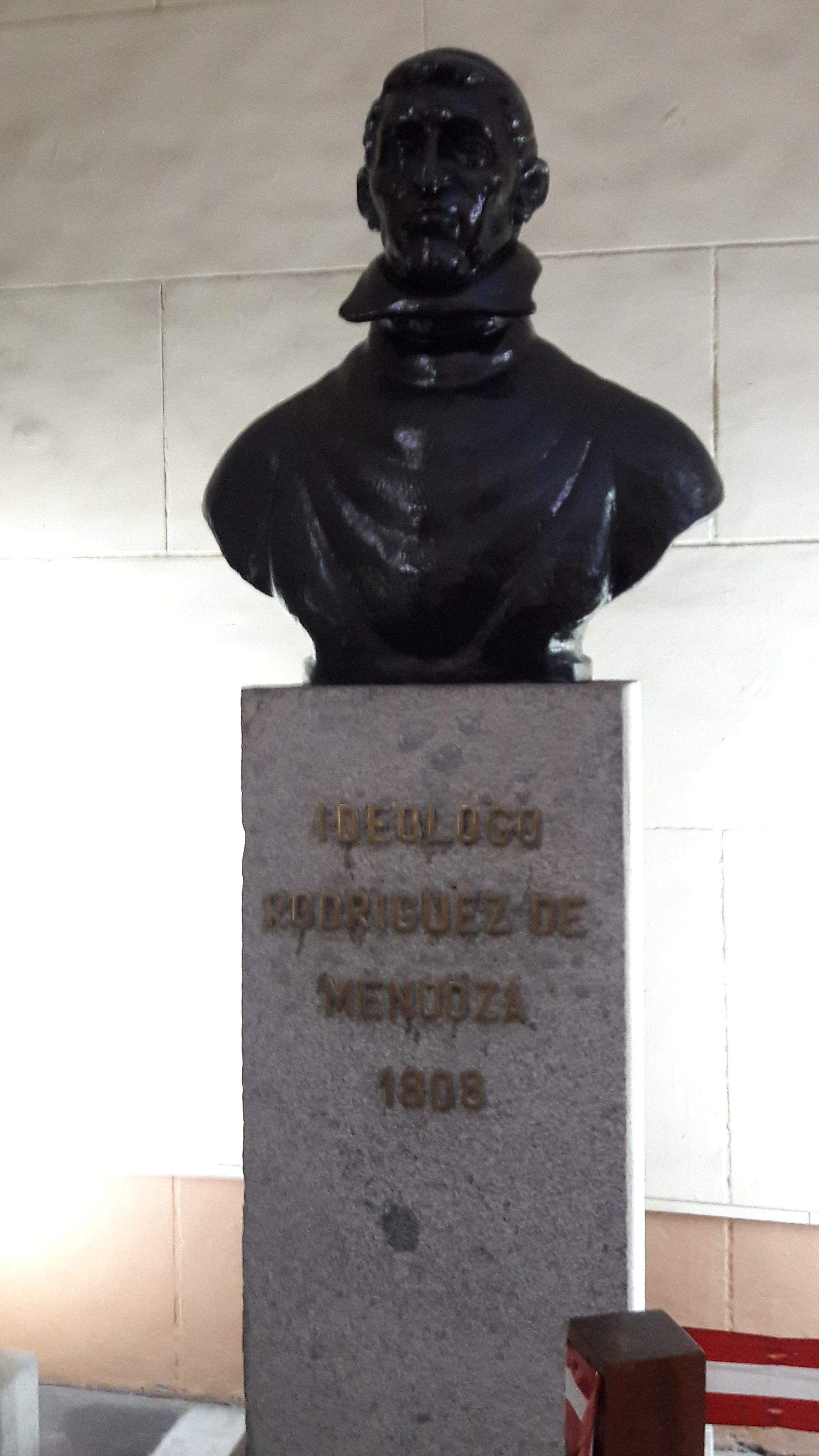 Ideologo Rodriguez de Mendoza 1808